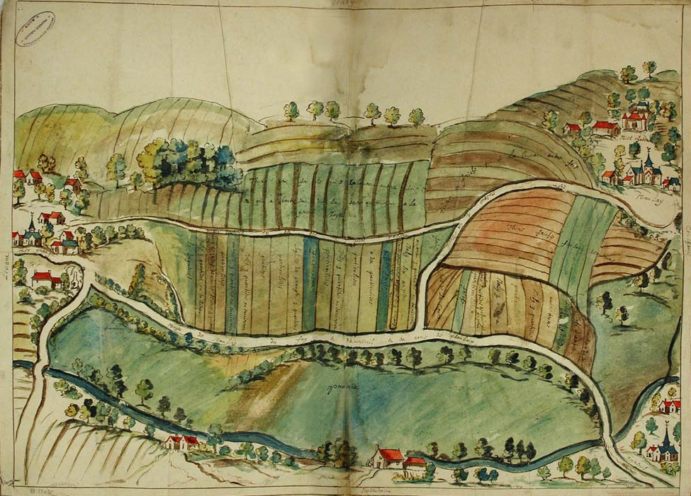 image de cf. titre